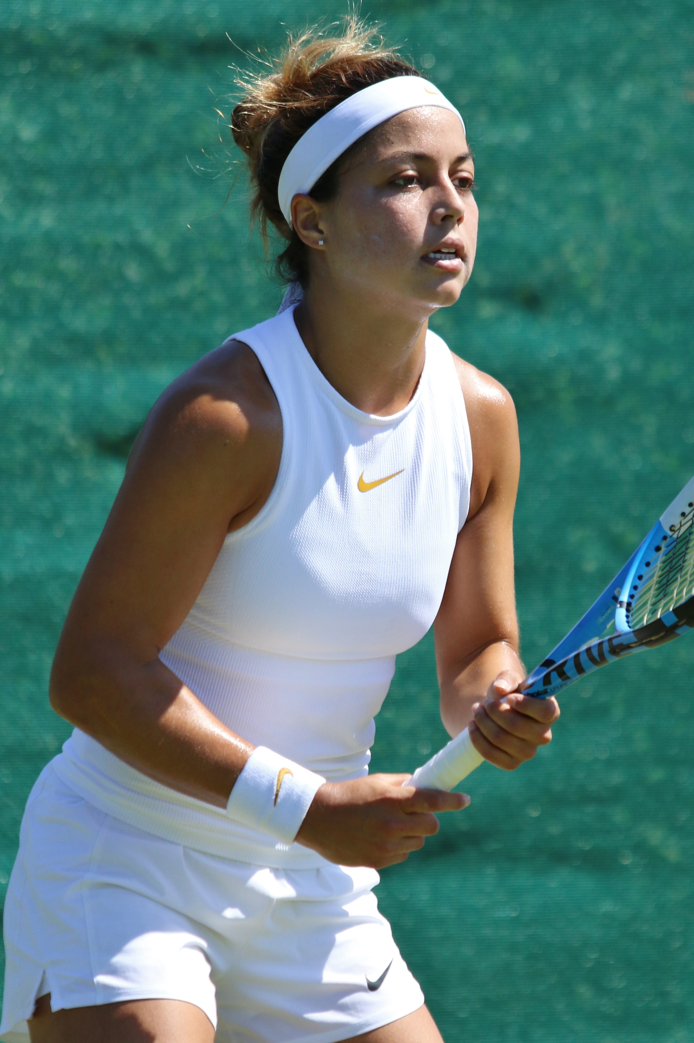 Zarazua WMQ18 (24)